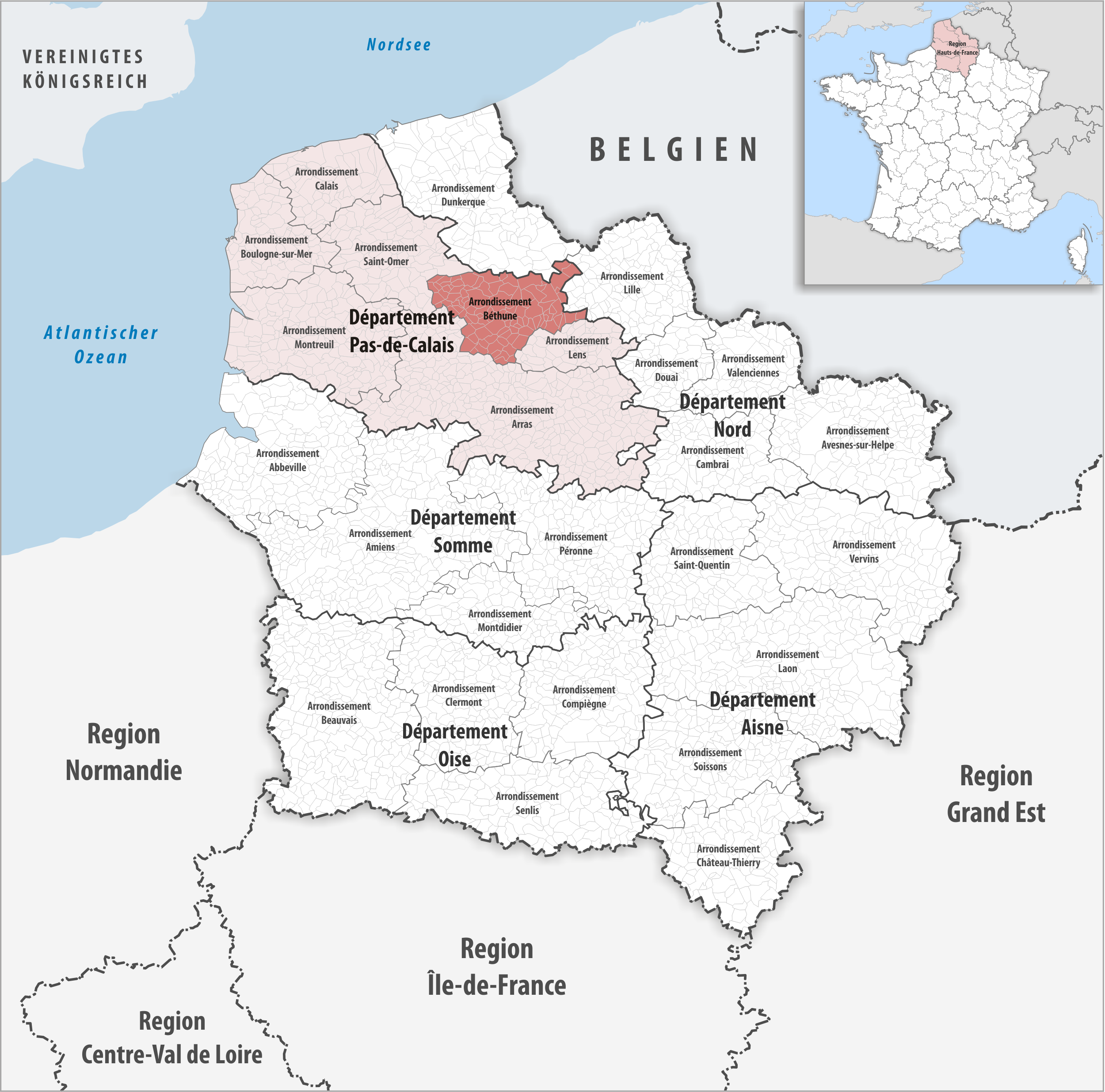 Lage des Arrondissements Béthune